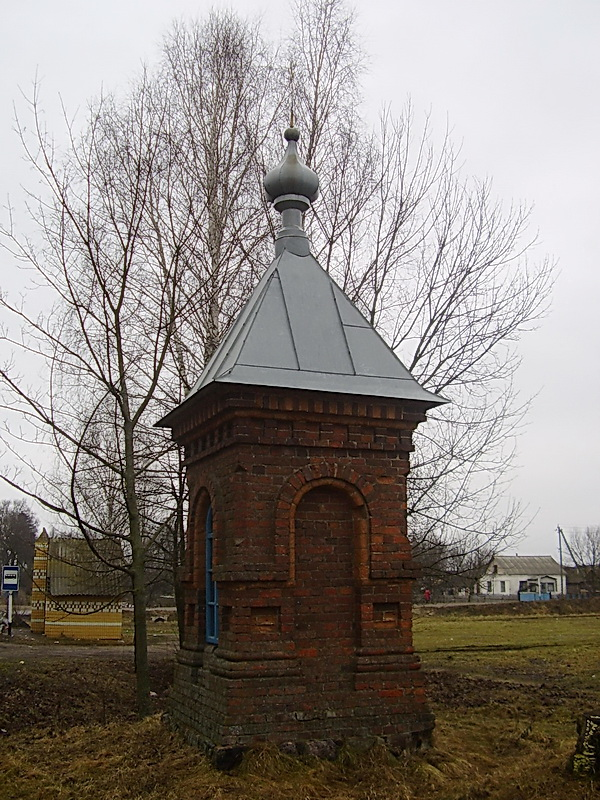 Ярэмічы. Калічка